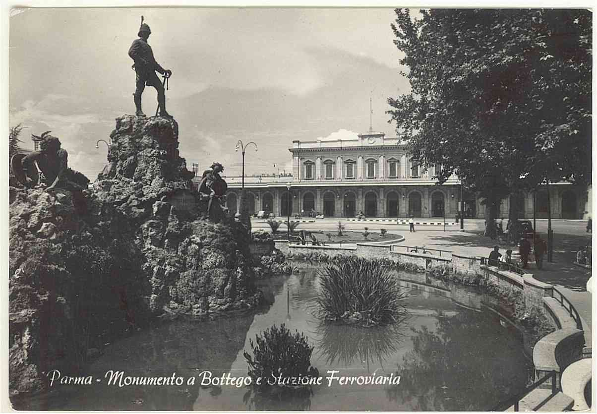 PR Parma monumento a Vittorio Bottego e Stazione ferroviaria